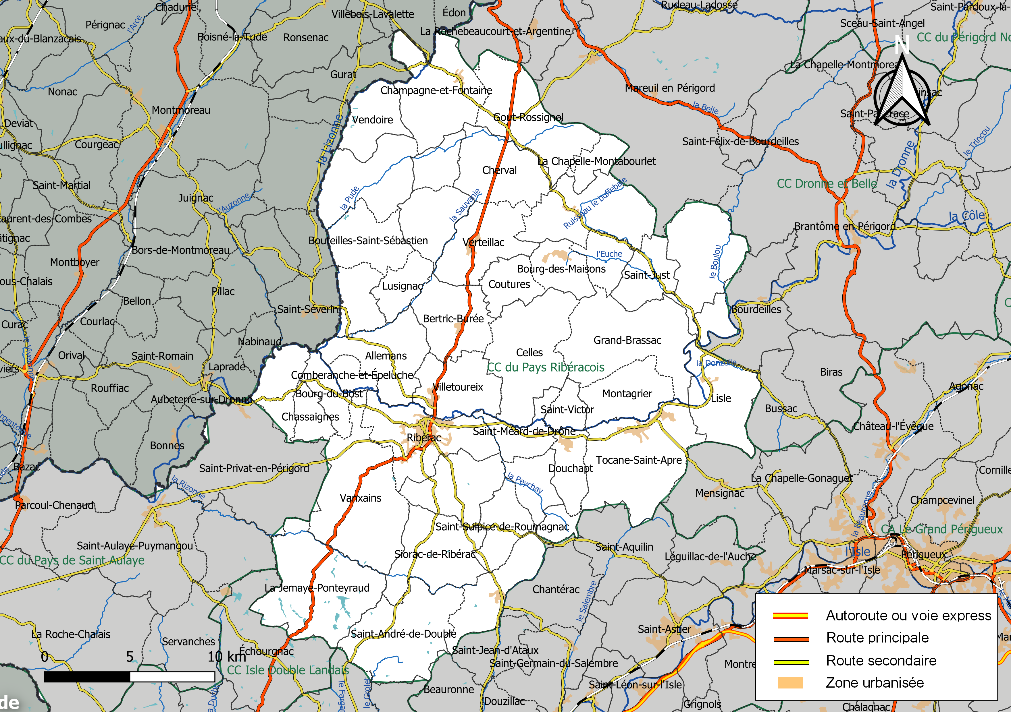 Carte géographique de la Communauté de communes du Pays Ribéracois, département de la Dordogne, France. Composition au 1er janvier 2019.